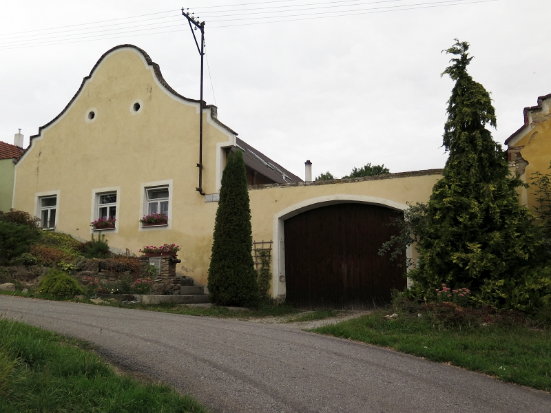 Usedlost čp. 14, Těšovice 14, Těšovice (okres Prachatice).